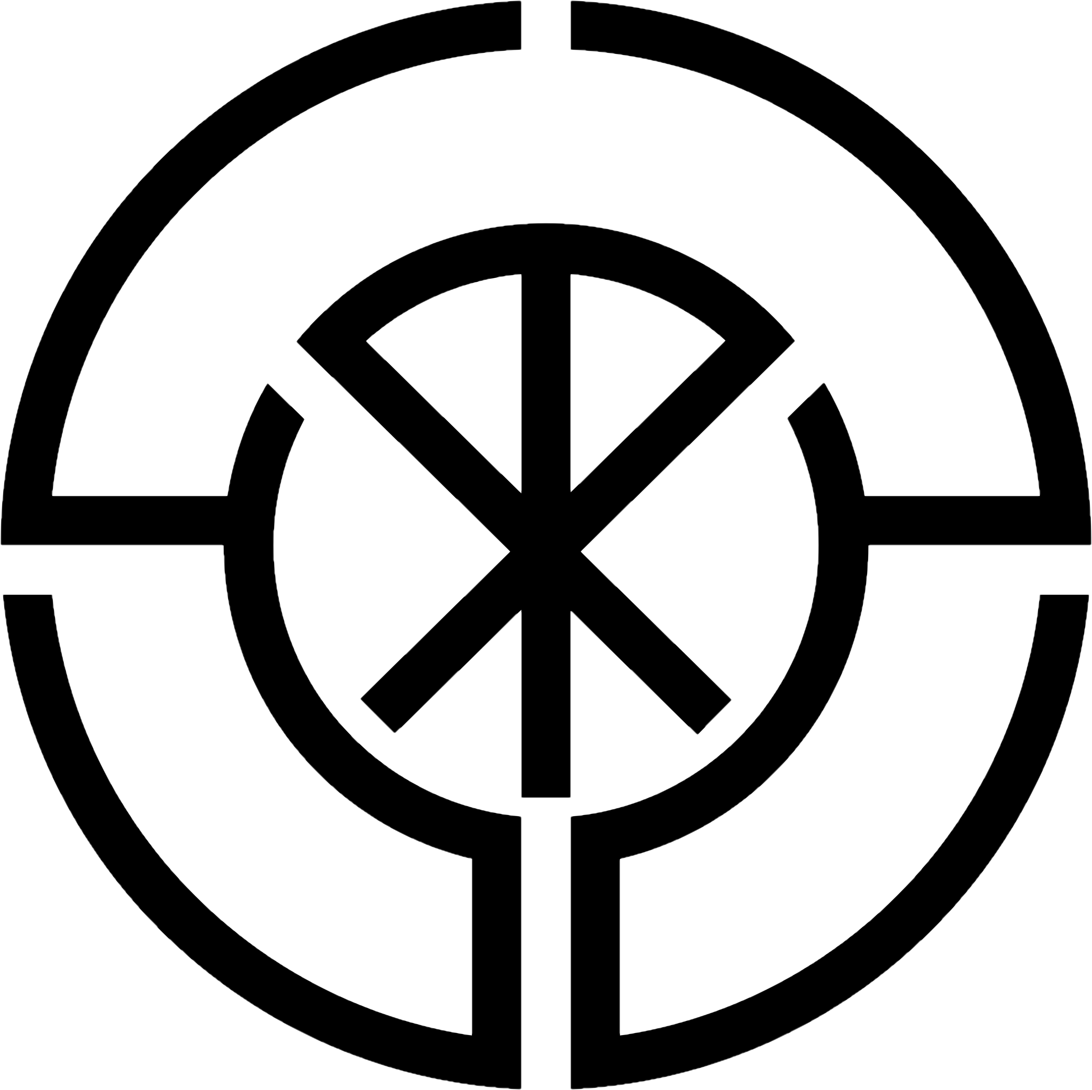 北大阪電気鉄道の社章